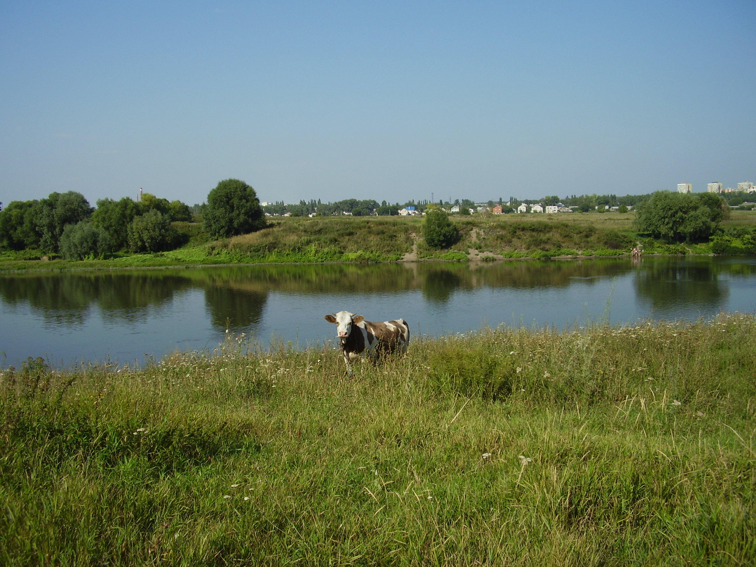 Корова у Дона (напротив посёлка Придонской)